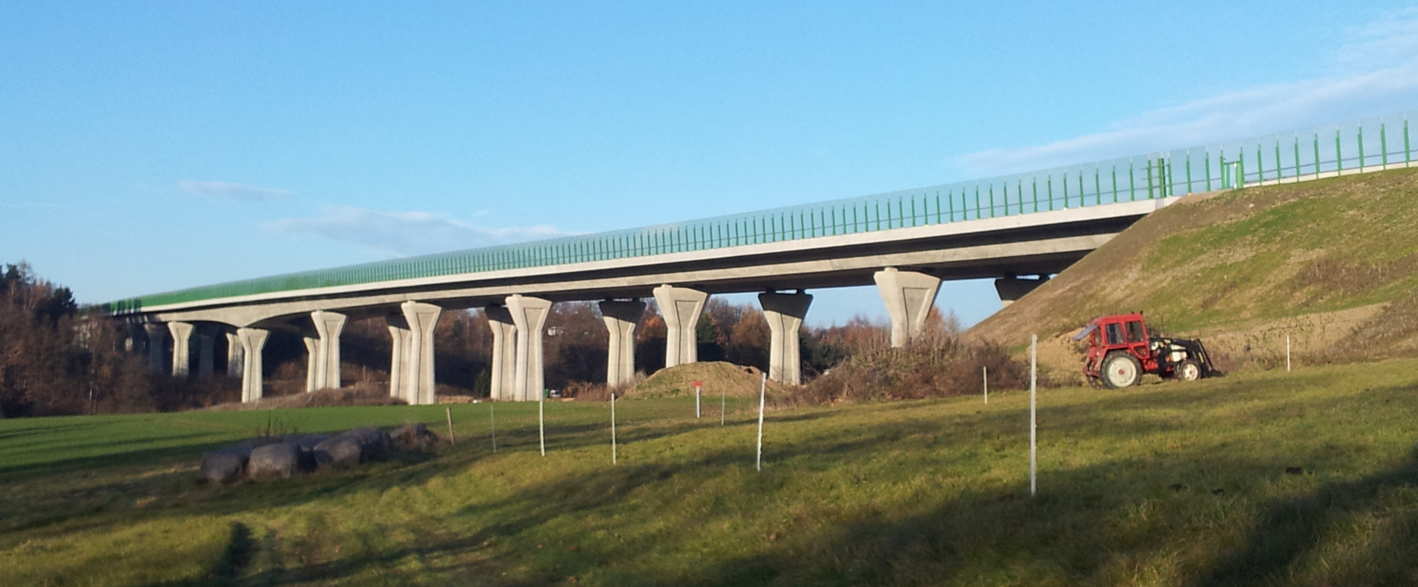 Brückenbauwerk Nr. 20 der Bundesautobahn 72 über die Zwickauer Mulde bei Penig im November 2011, Blickrichtung Norden